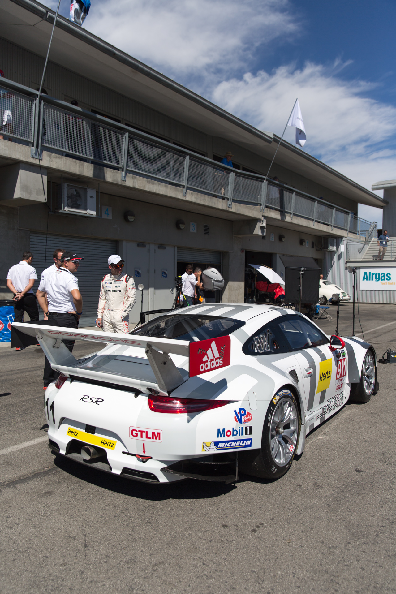 Rennsport Reunion V